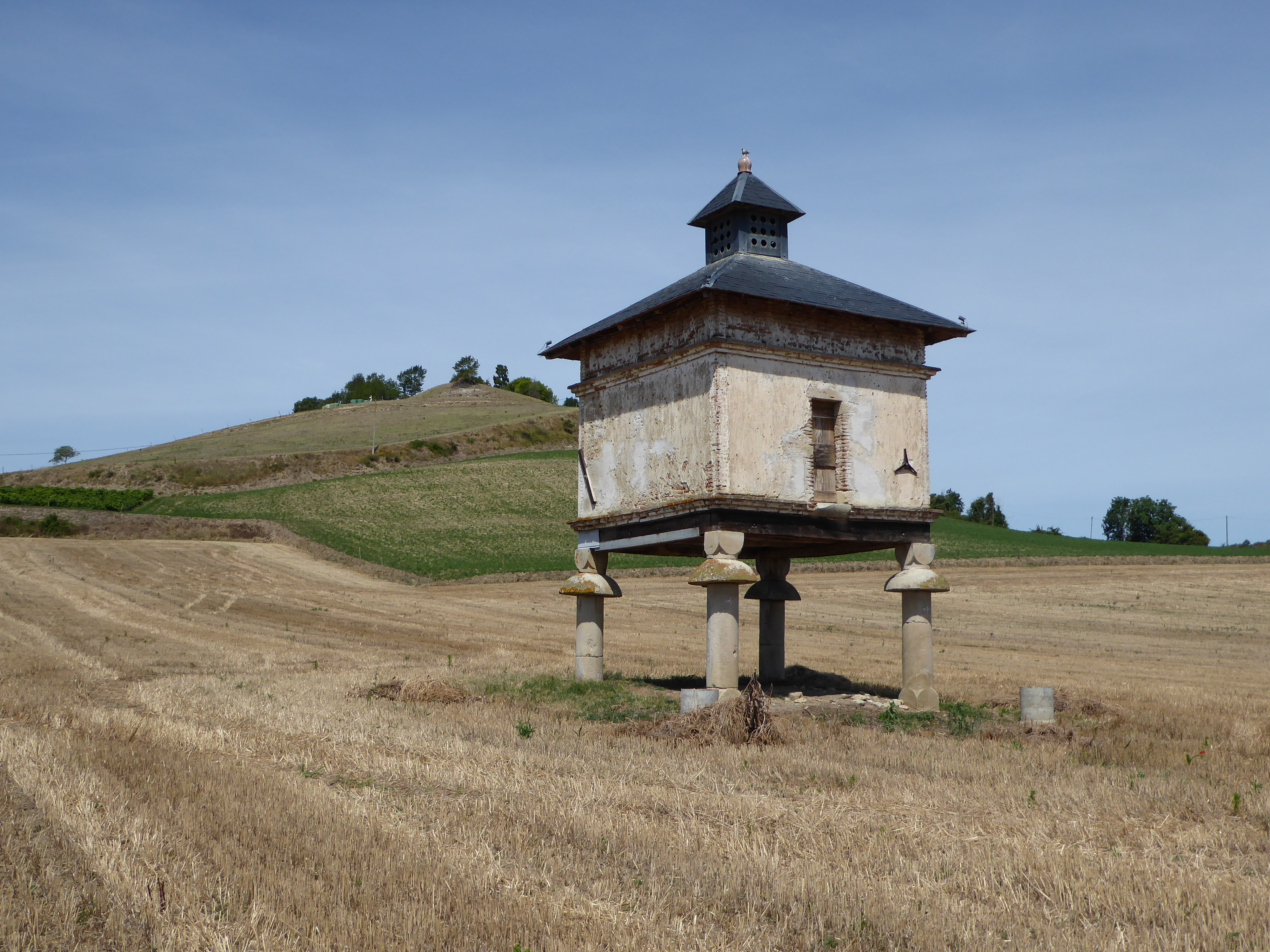 Pigeonnier du Colombier, Saint-Germain-des-Prés, Tarn en 2016